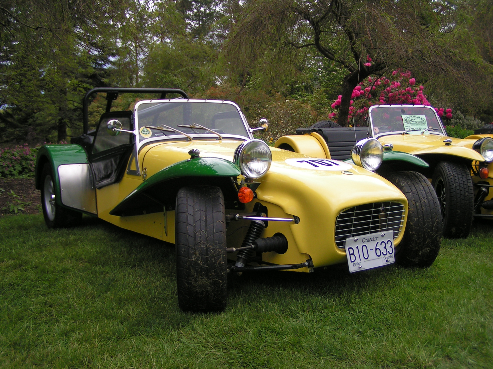 1965 Lotus Seven Series II1965 Lotus Seven Series II